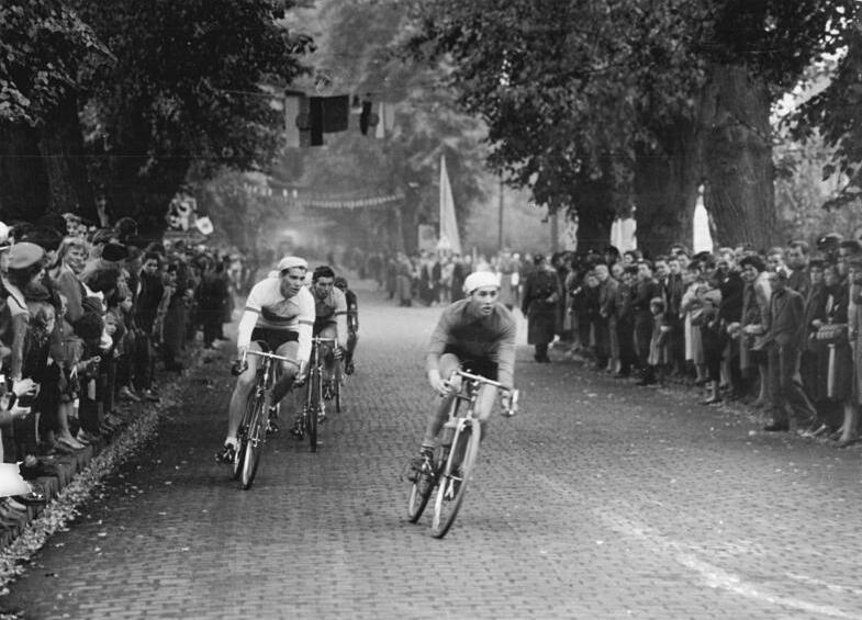 Wische, Straßenrennen des FDJ Zentralbild Weiß Sd-Fr 17.10.1960 - Grabo gewann großen FDJ-Wische-Preis. In der altmärkischen Wische trafen am 15.10.1960 einige der besten Straßenfahrer der DDR beim großen FDJ-Wische-Preis aufeinander. Daei sorgte der Leipziger Grabo (SC Wissenschaft DHfK Leipzig) für einen Überraschungssieg. UBz: Die Spitzengruppe auf der Strecke.